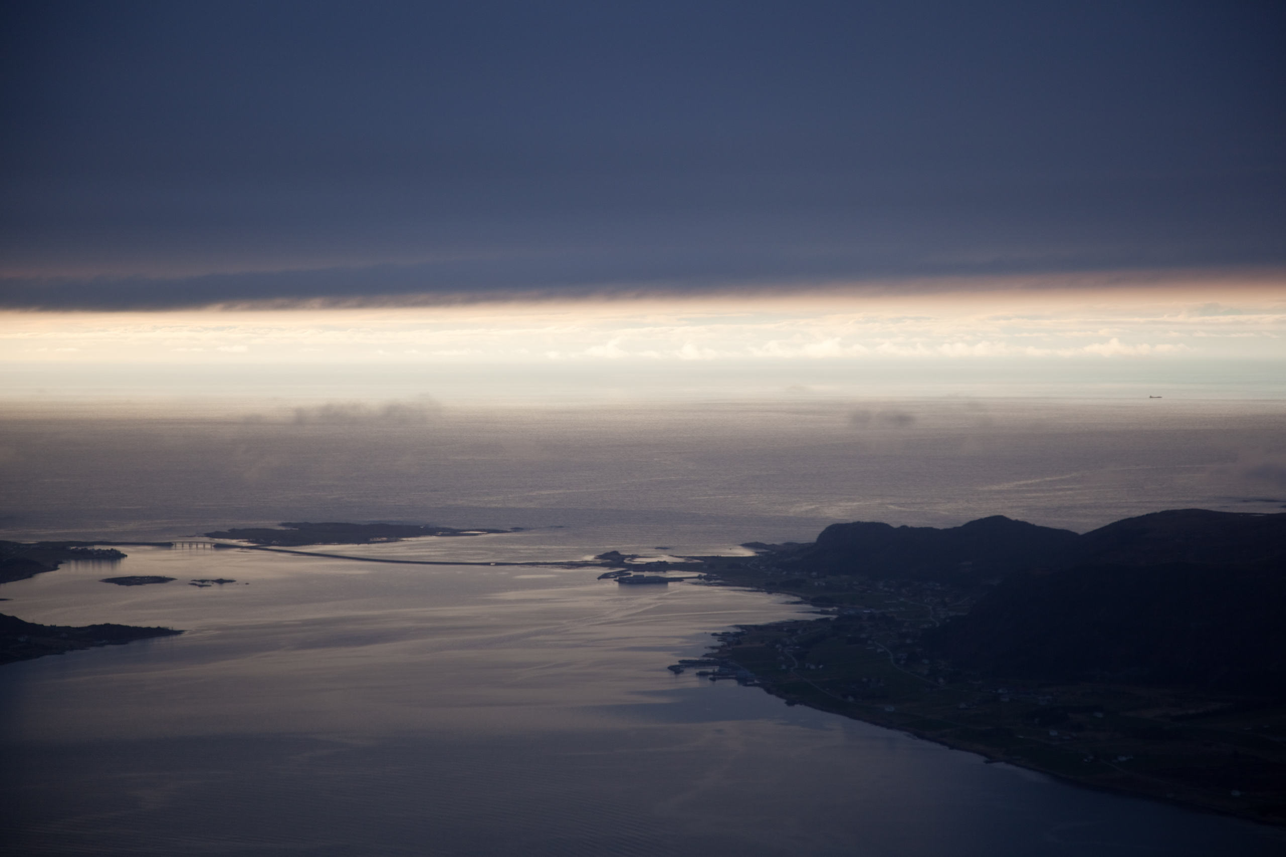 Ullasundet mellom Haramsøya til venster og Flemsøya/Skuløya/Longva til høgre. Ullasundbrua og tilhøyrande vegfyllingar mellom øyane. Fylkesveg 150 i Møre og Romsdal